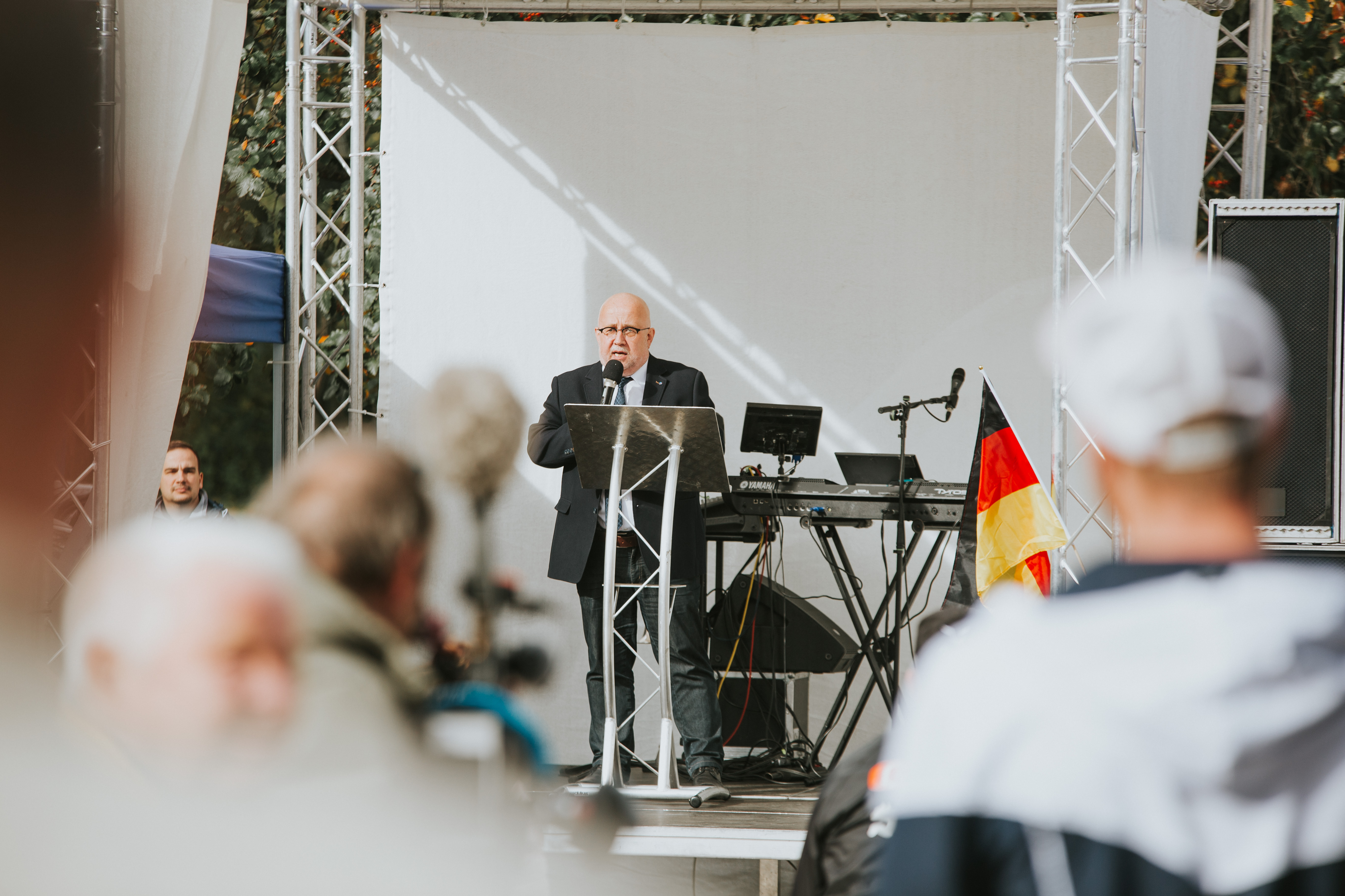 Bundesabgeordneter Jürgen Pohl auf einer Wahlkampfveranstaltung der AfD zur Thüringer Landtagswahl 2019 in Nordhausen